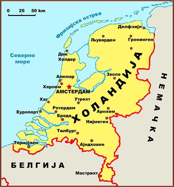 Аутор: Саша Костић Мапа Холандије Licensing